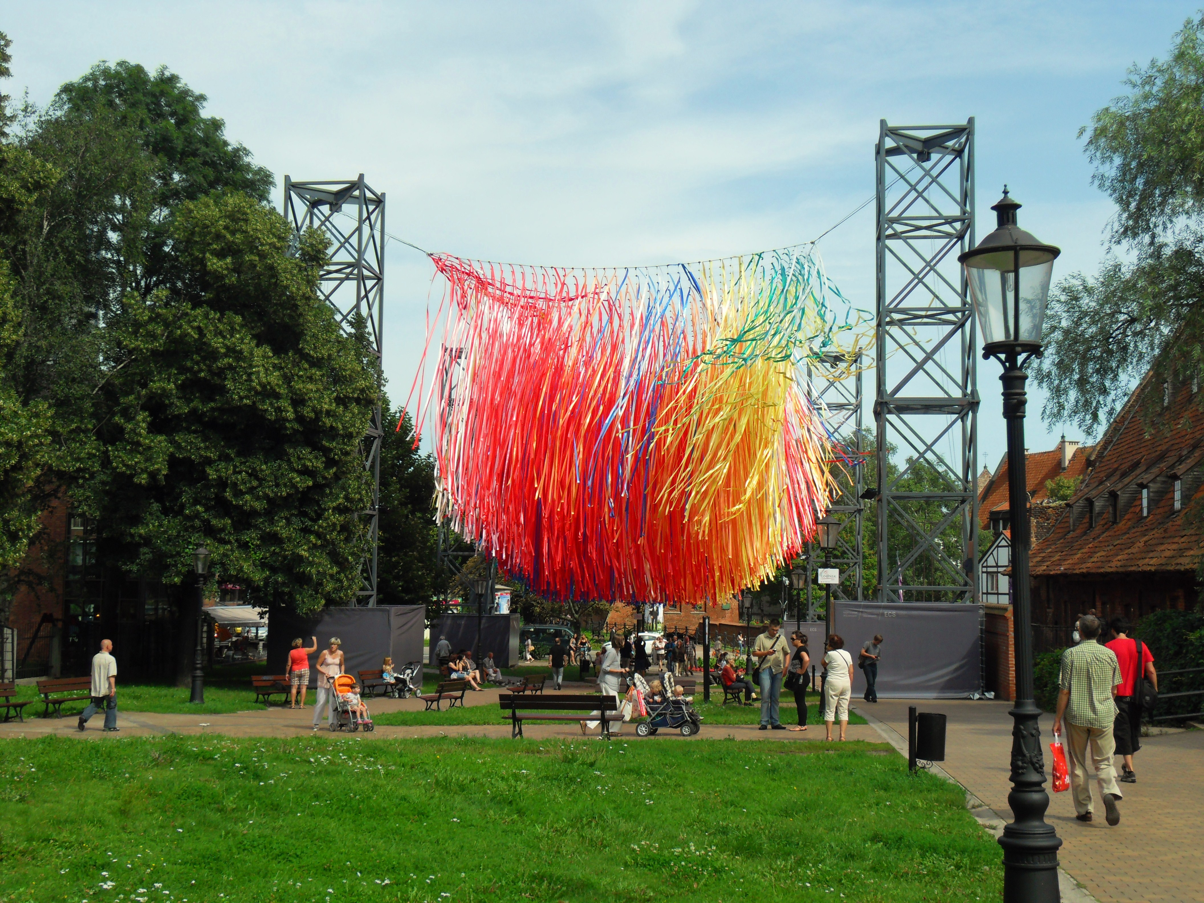 Gdańsk Stare Miasto, skwer Heweliusza. Instalacja "Koncert na wstążki", autor Jerzy Janiszewski.